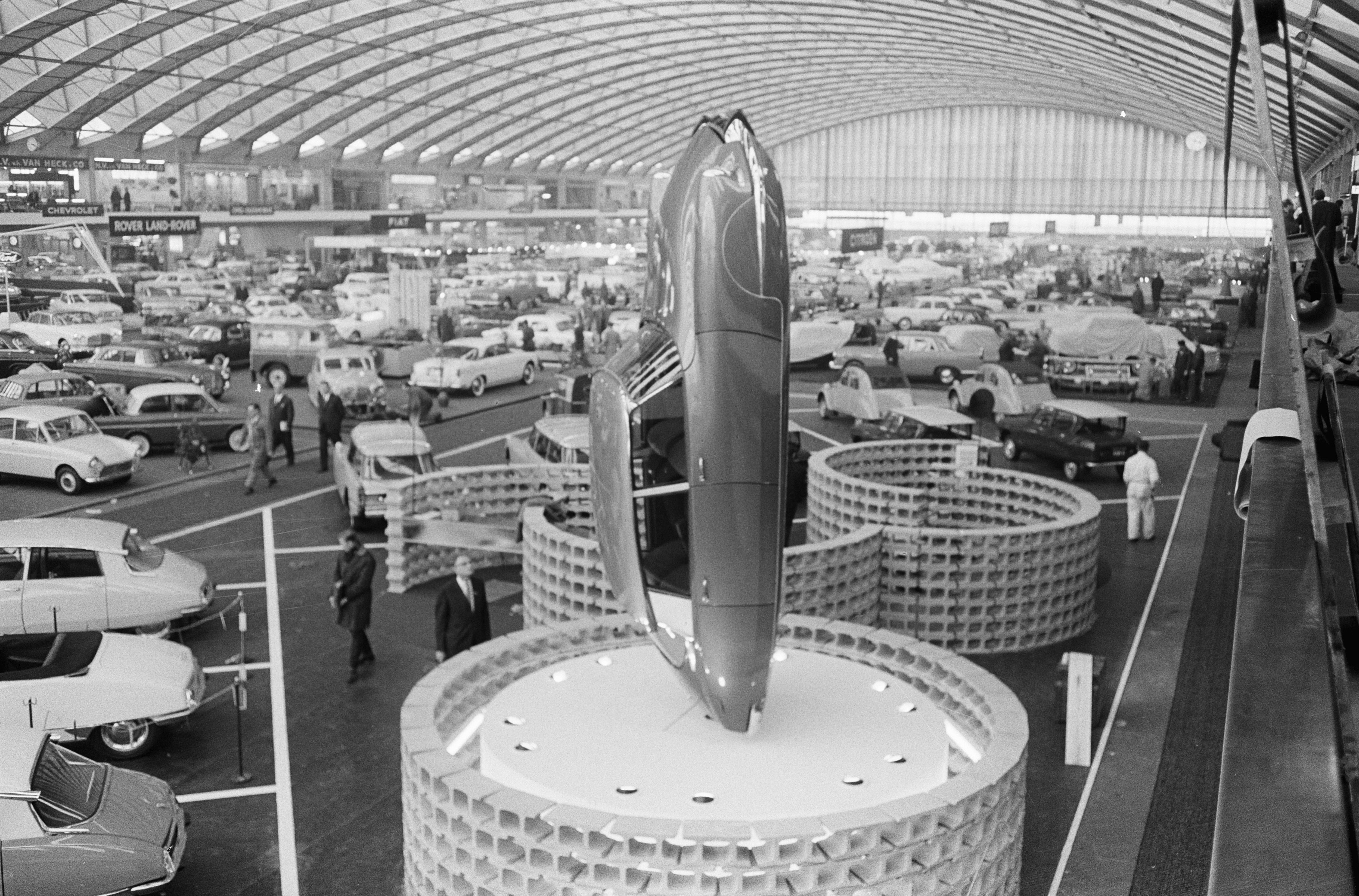 Collectie / Archief : Fotocollectie Anefo Reportage / Serie : [ onbekend ] Beschrijving : 46e Personen automobieltentoonstelling in RAI, overzicht van de grote Europahal Datum : 6 februari 1963 Locatie : Amsterdam, Noord-Holland Trefwoorden : overzichten Persoonsnaam : Europahal Instellingsnaam : RAI Fotograaf : Pot, Harry / Anefo Auteursrechthebbende : Nationaal Archief Materiaalsoort : Negatief (zwart/wit) Nummer archiefinventaris : bekijk toegang 2.24.01.05 Bestanddeelnummer : 914-7914